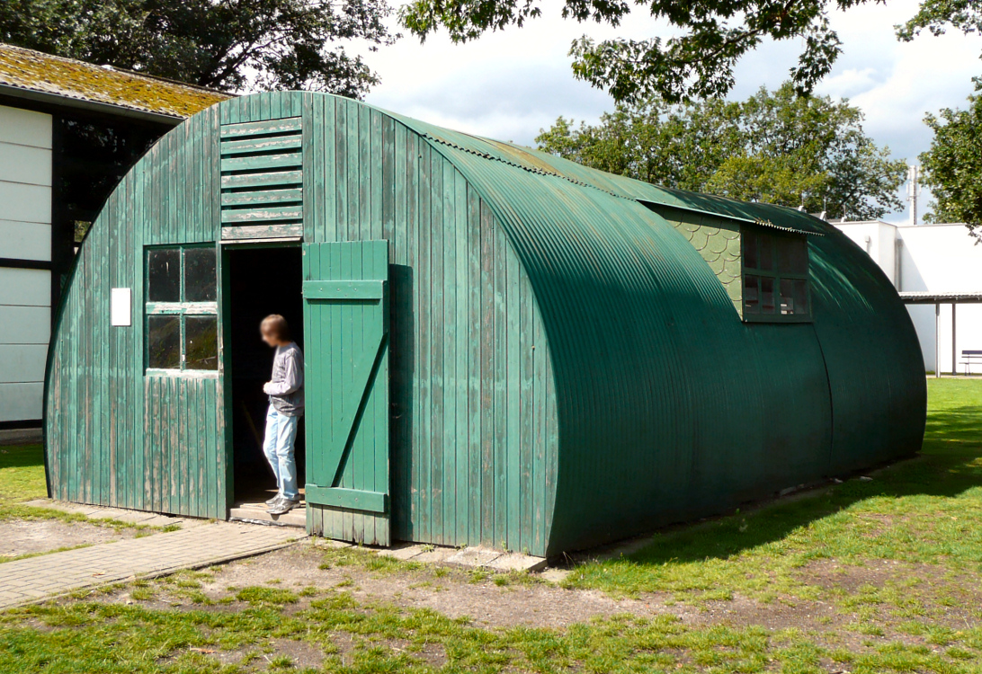 Nissenhütte